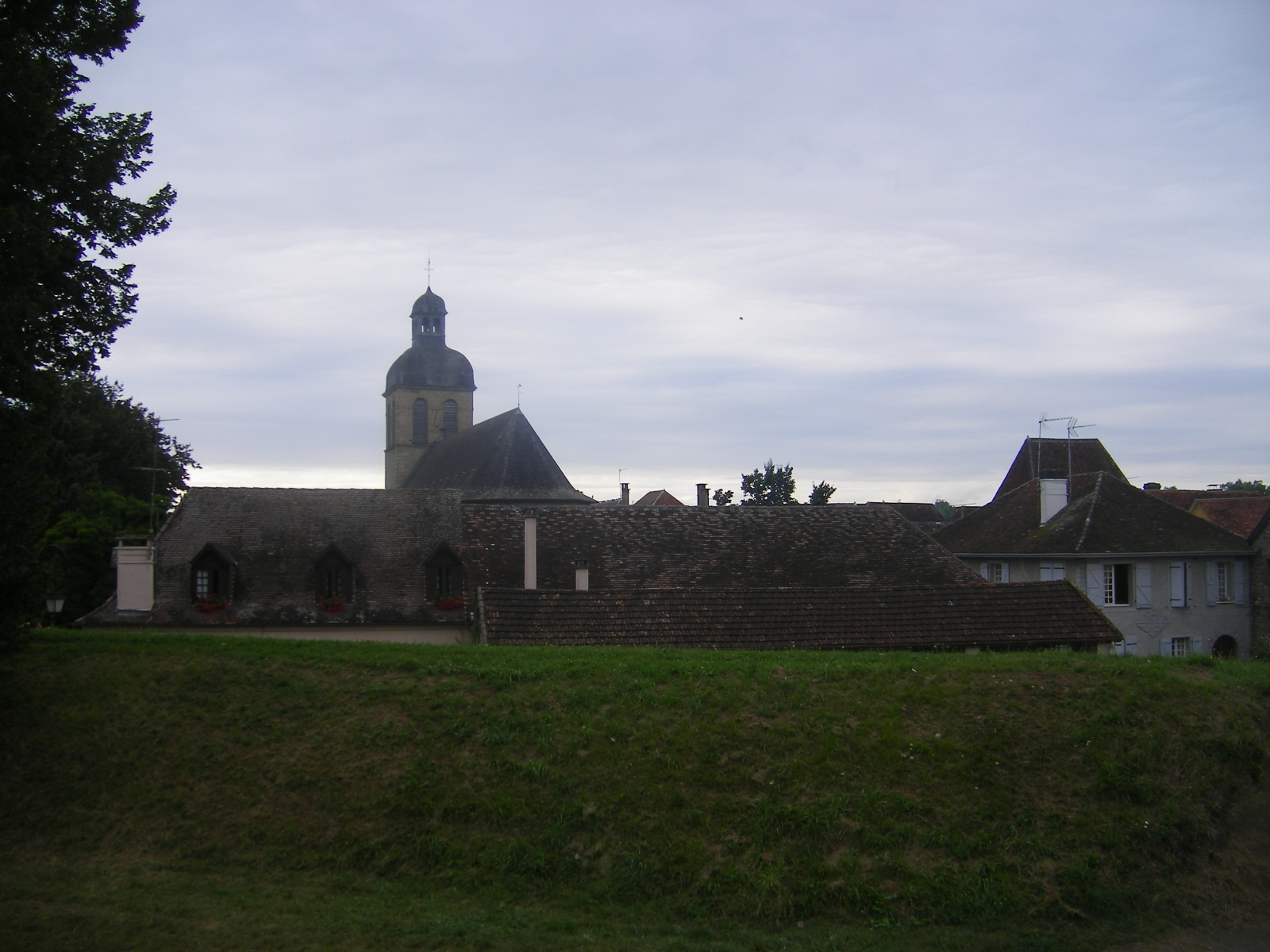 Navarrenx